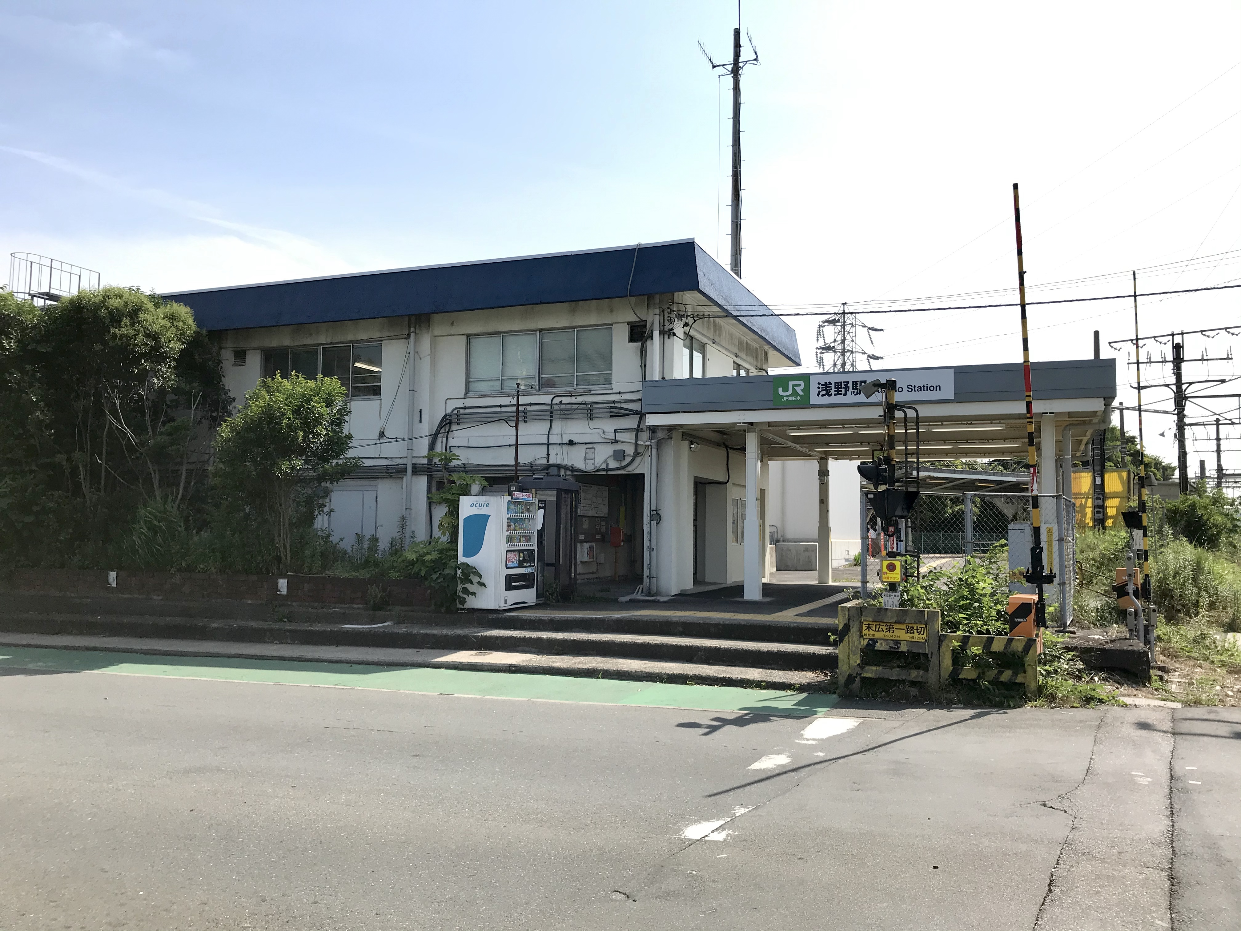 JR東日本鶴見線浅野駅駅舎